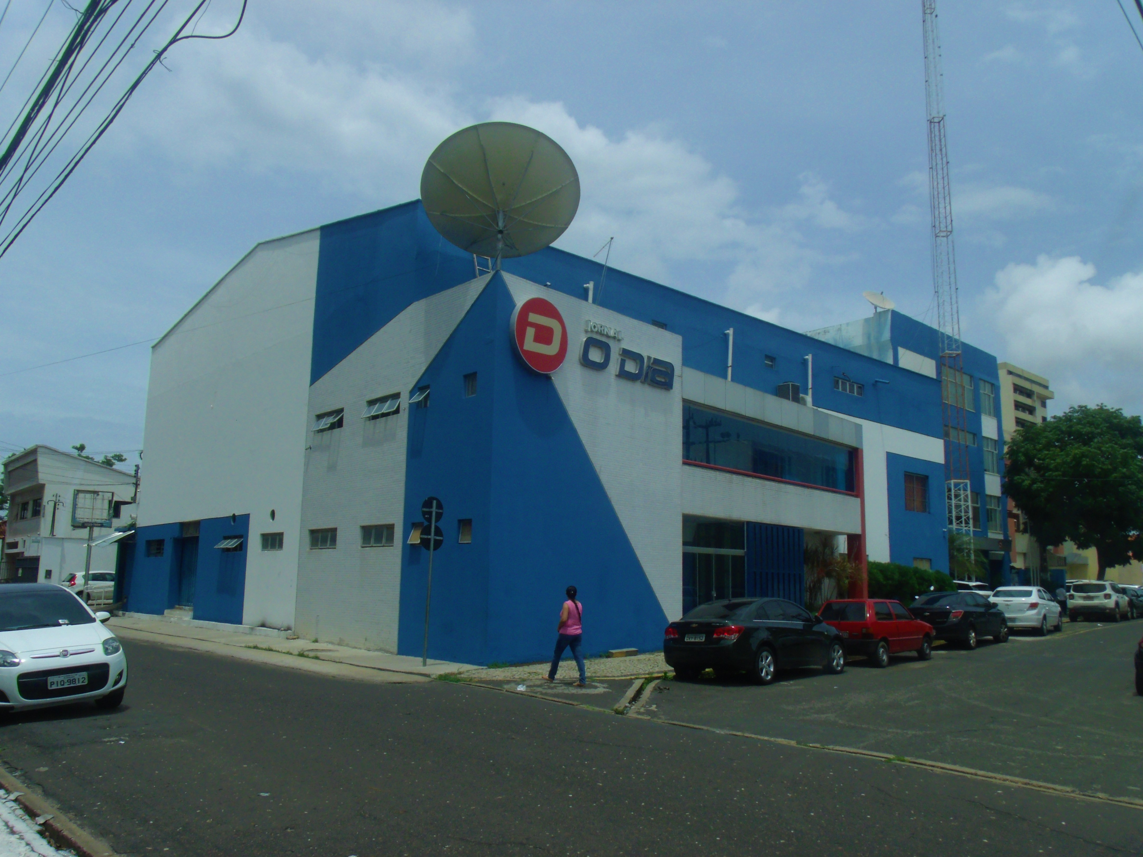 Edifício Octávio Miranda sede do jornal O Dia (Teresina).